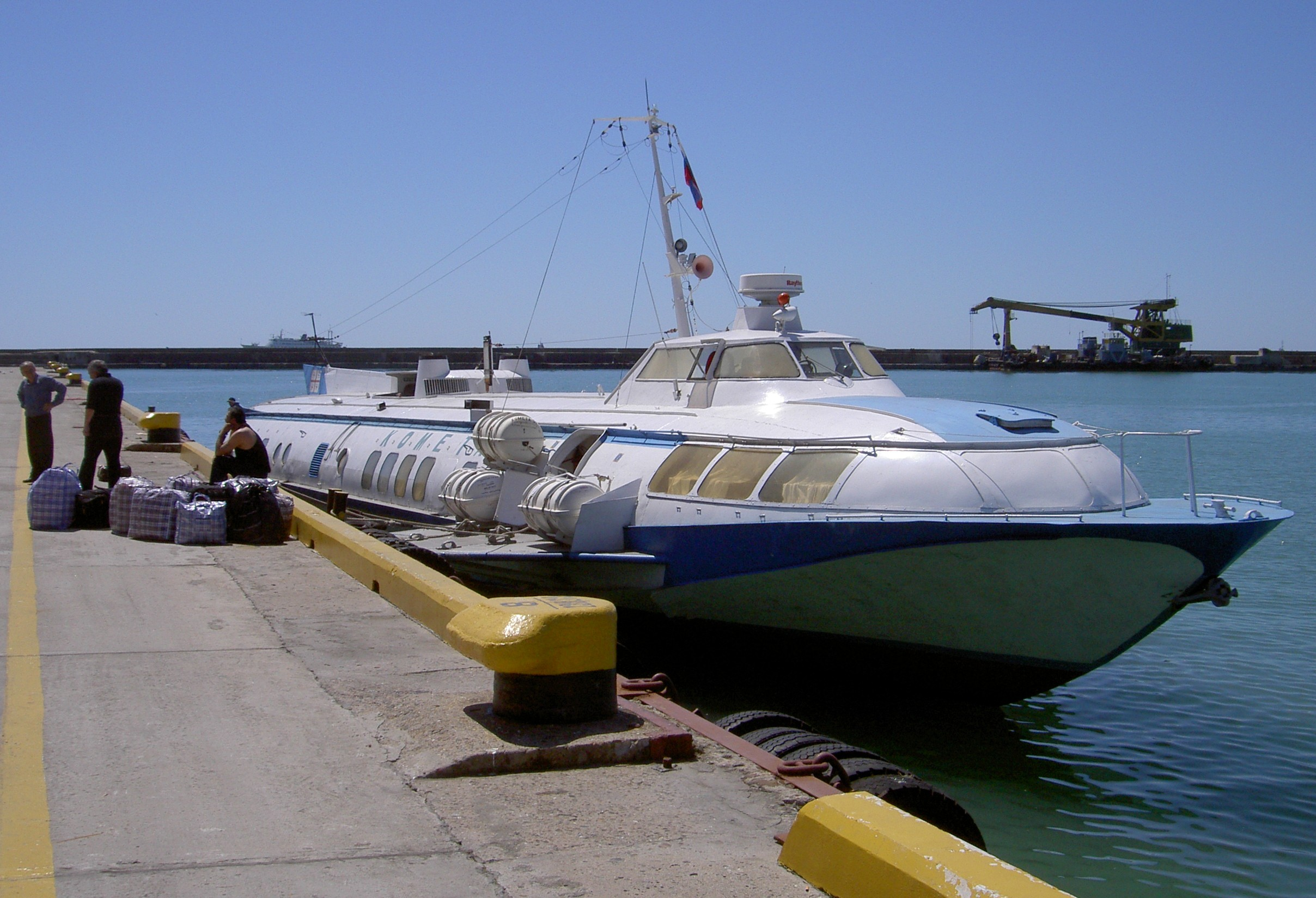 Bärplansbåt Kometa av sovjetisk konstruktion. Min egen bild.